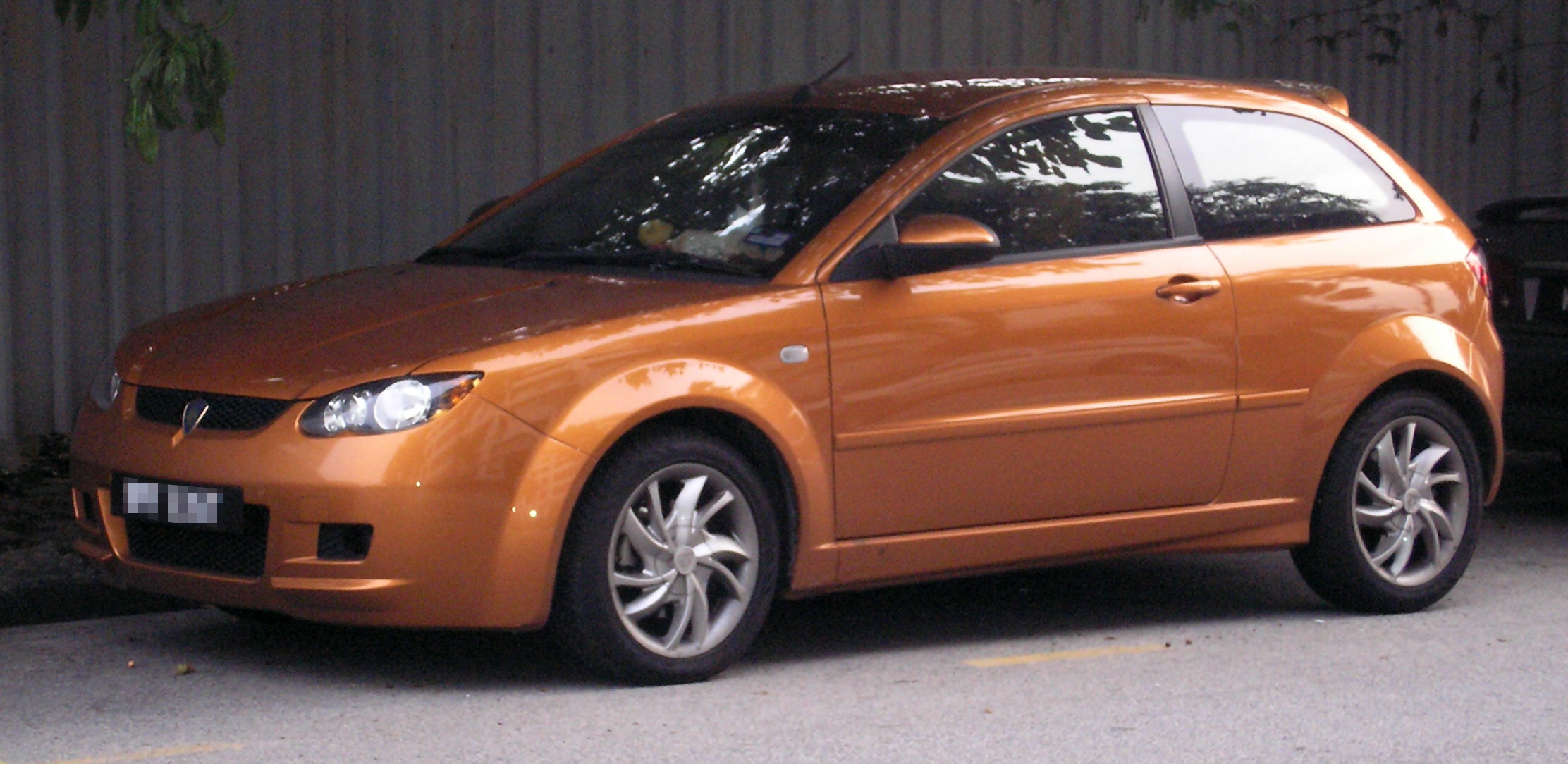 A Proton Satria Neo in Kuala Lumpur, Malaysia.